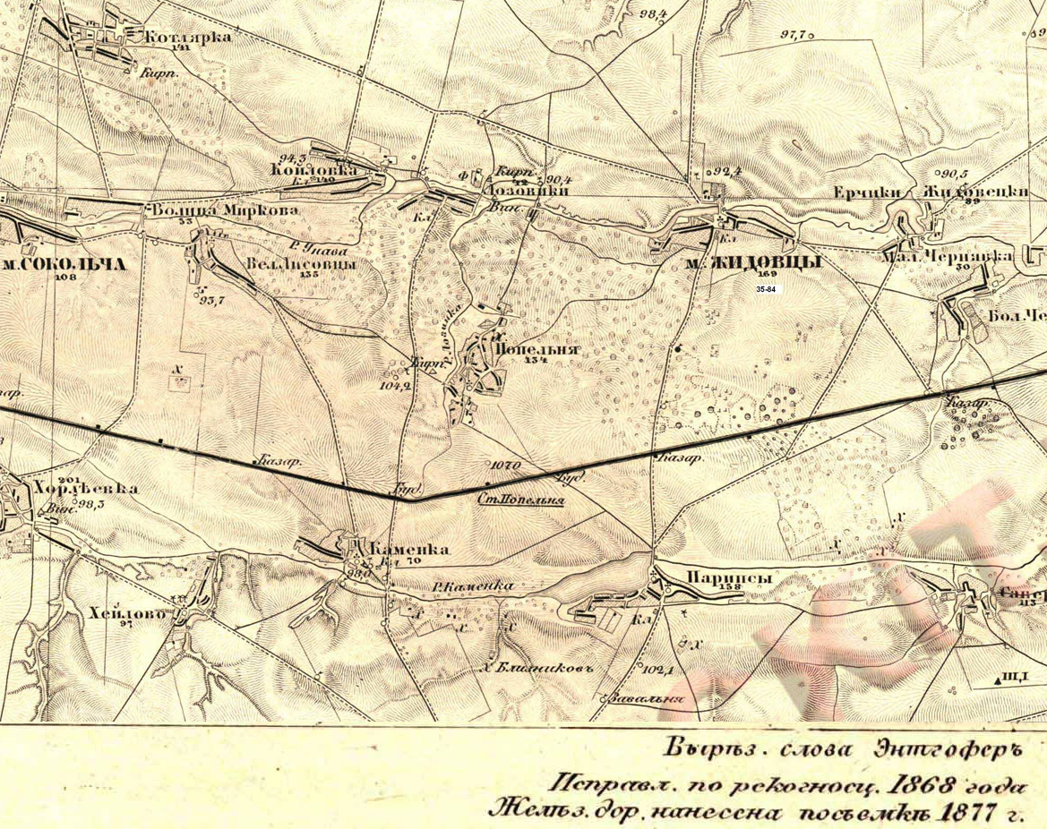 Карта села Попільня, Попільнянського району Житомирської області, за 1868 рік